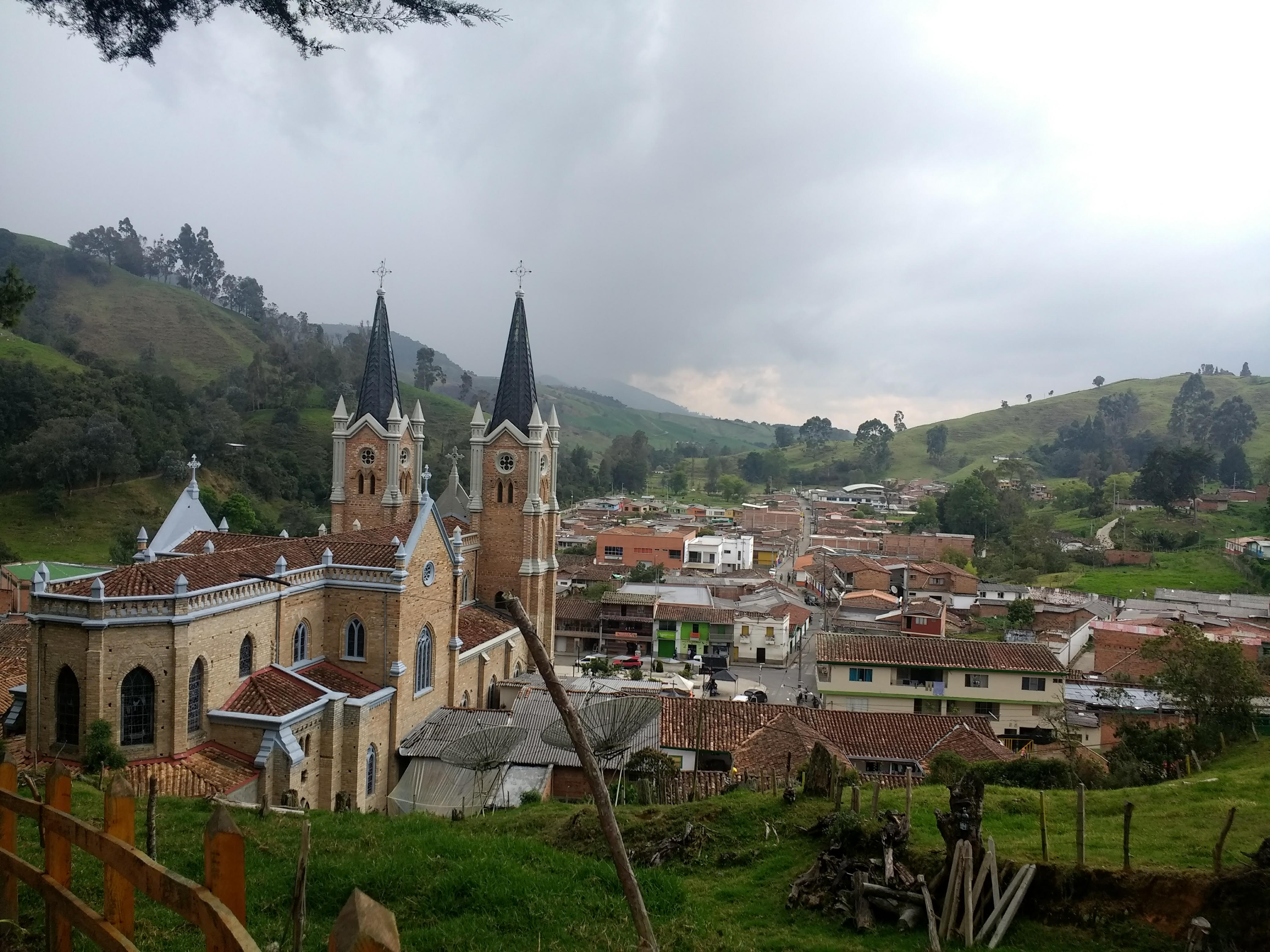 Iglesia de Nuestra Señora del Rosario, Belmira